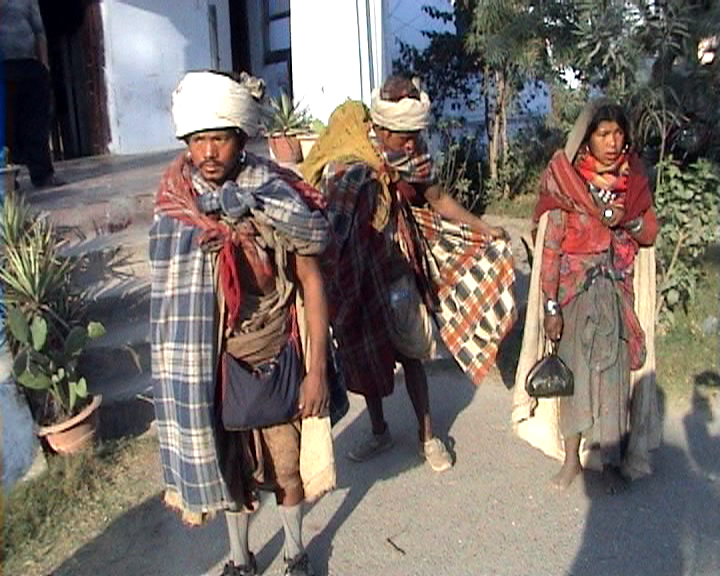 नेपाली: राउटे जाति